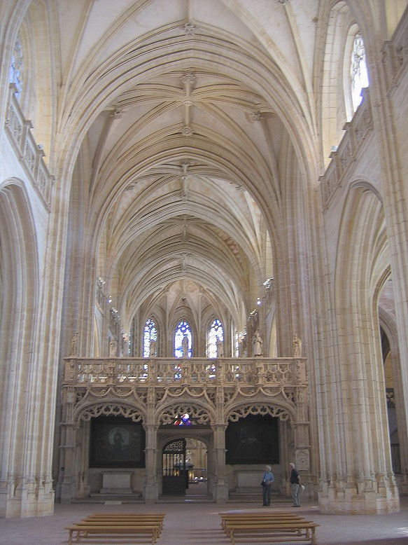 Abteikirche Brou, Bourg-en-Bresse, Hauptschiff